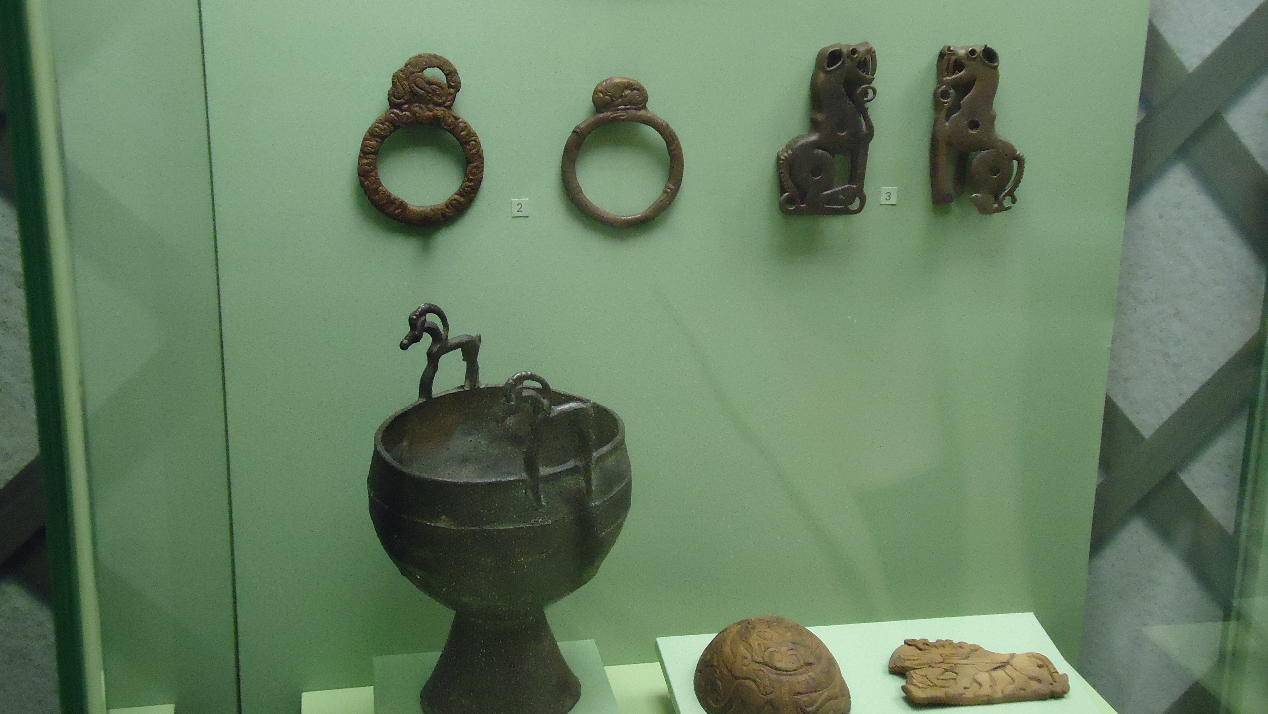 Экспонаты из деревни Шохтой